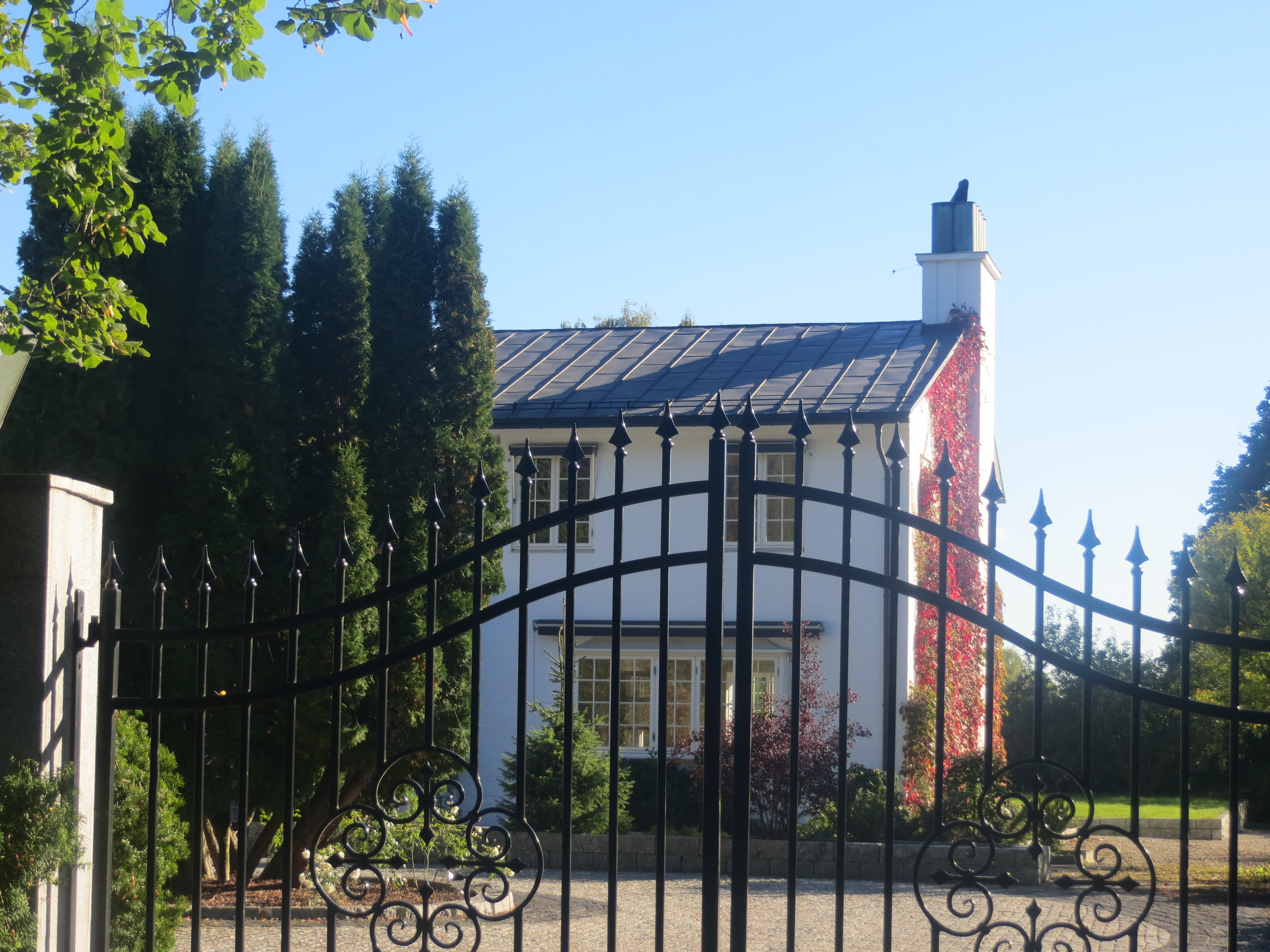 Munkebakken, Fornebu (Bærum)